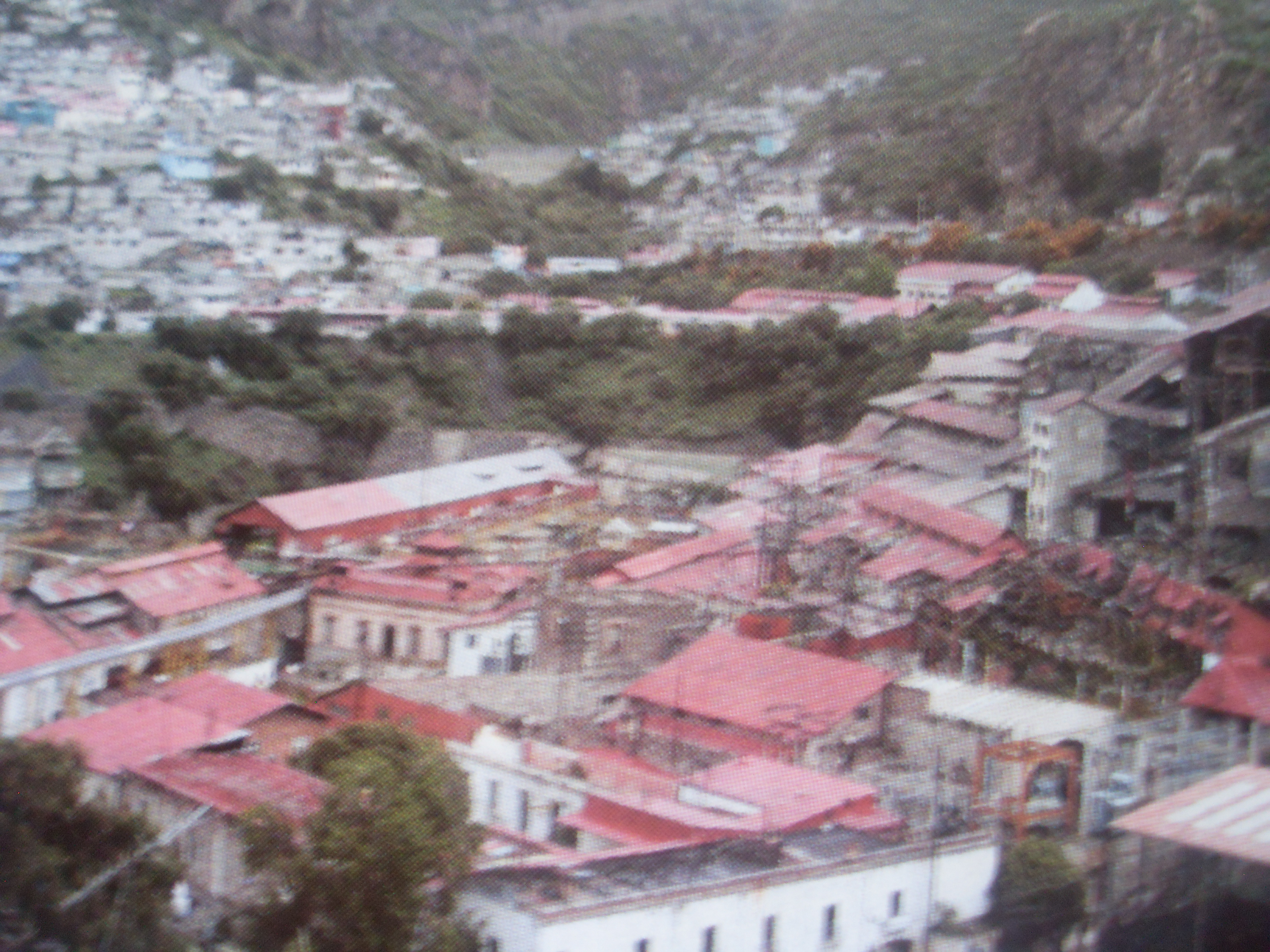 Mina de San Juan y Hacienda de Beneficio de Loreto en Pachuca de Soto, México